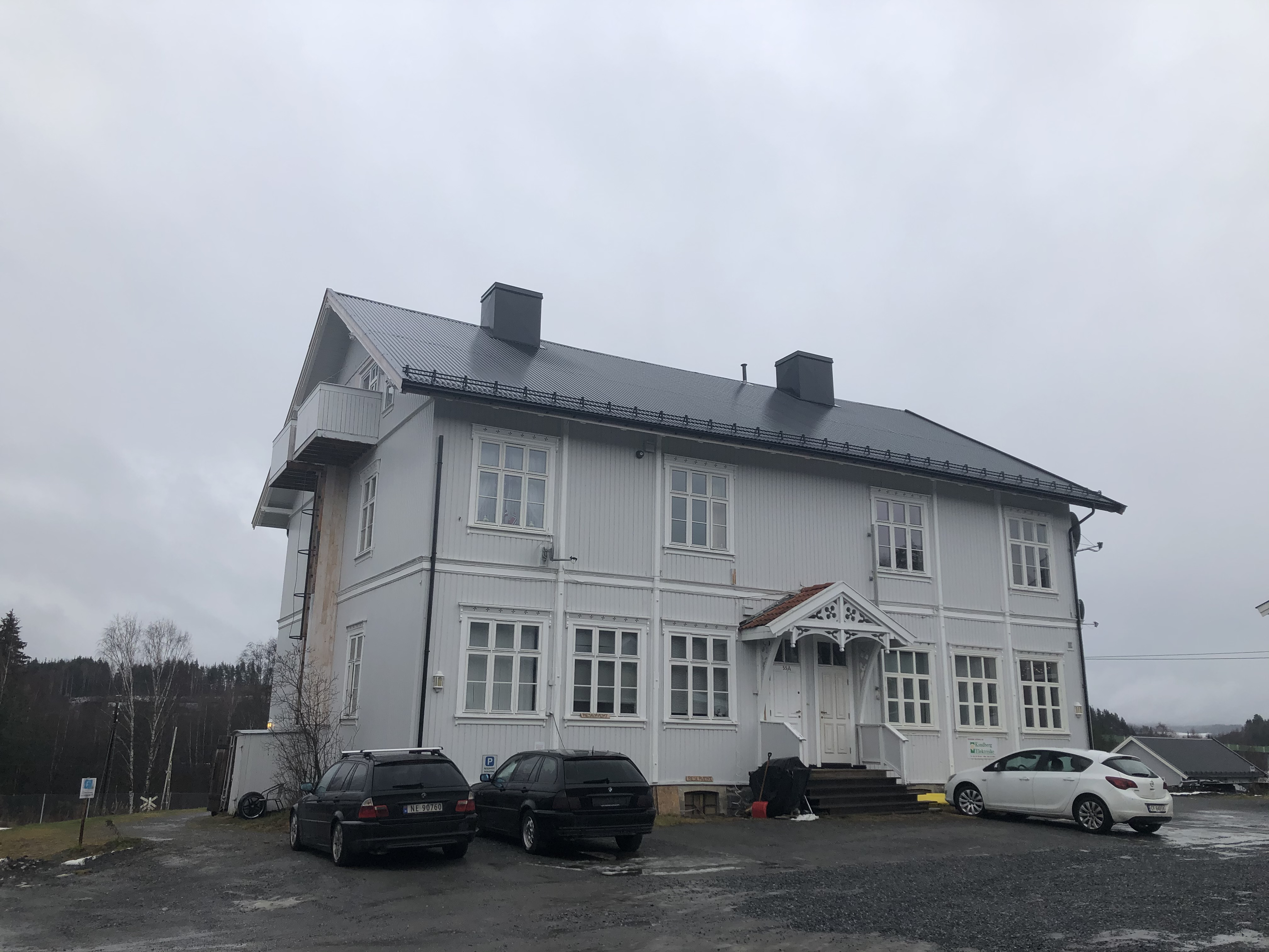 Glederudveien 53 - Gamle Follum skole, Hønefoss